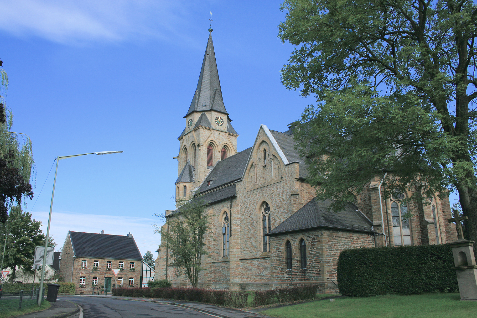 Much-Marienfeld, Kirche St. Mariae Himmelfahrt